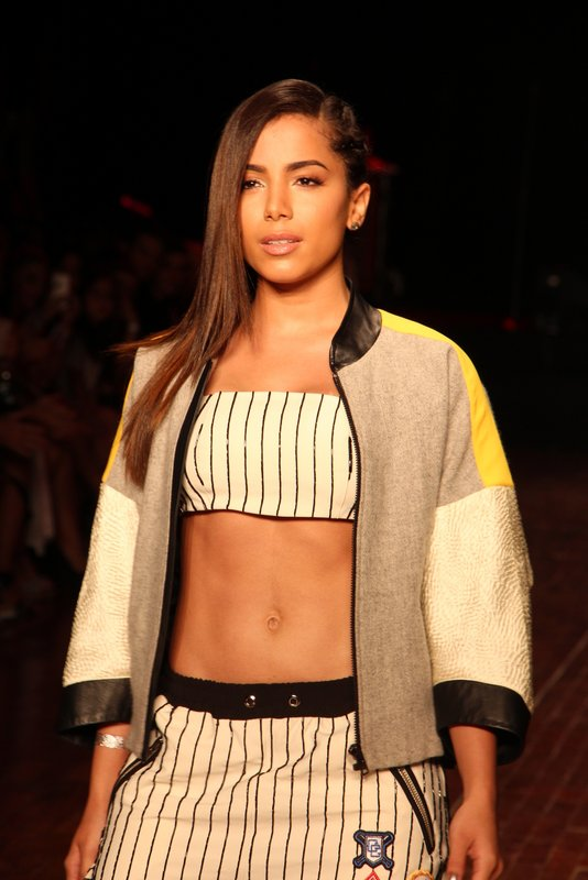 Anitta para Coca Cola Jeans.